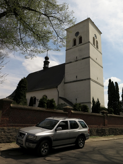 Kostel svatého Mikuláše, na severovýchodním okraji obce, Šumvald.